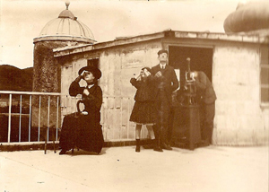 observatoire 1